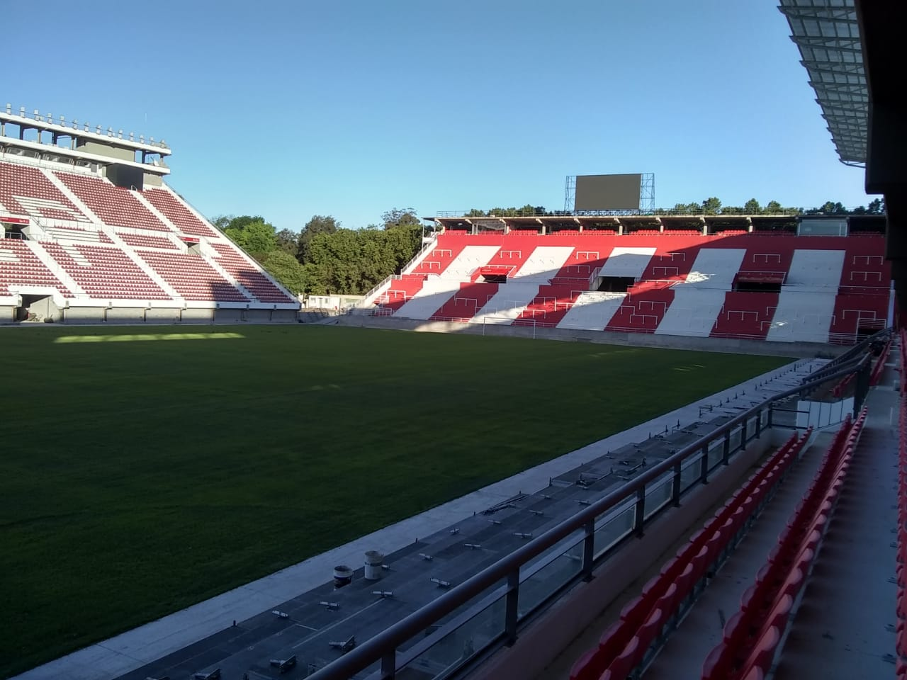 Vista general del Estadio Jorge Luis Hirschi, propiedad del Club Estudiantes de La Plata, desde la nueva platea oficial.